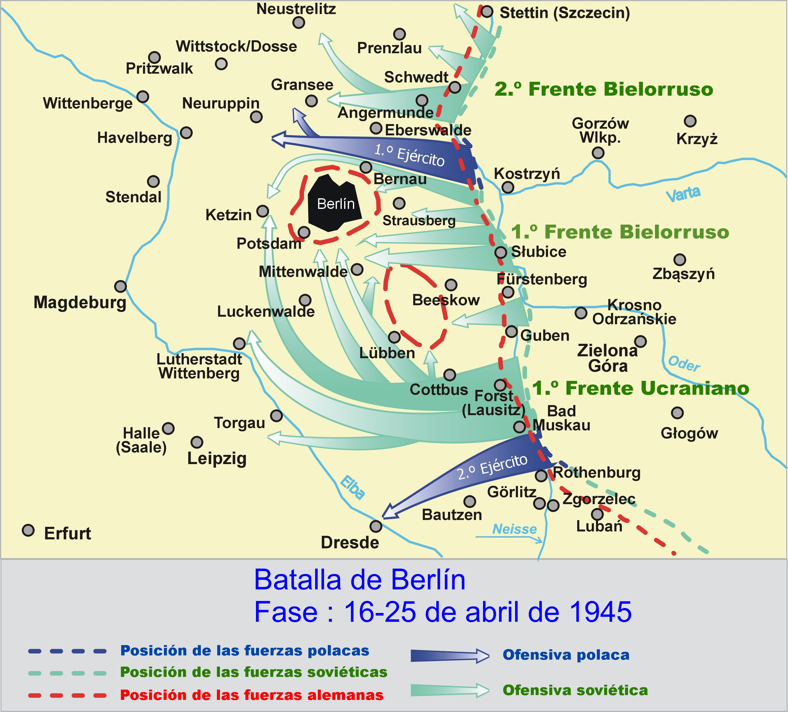 Mapa en el que se representa la primera fase de la batalla de Berlín